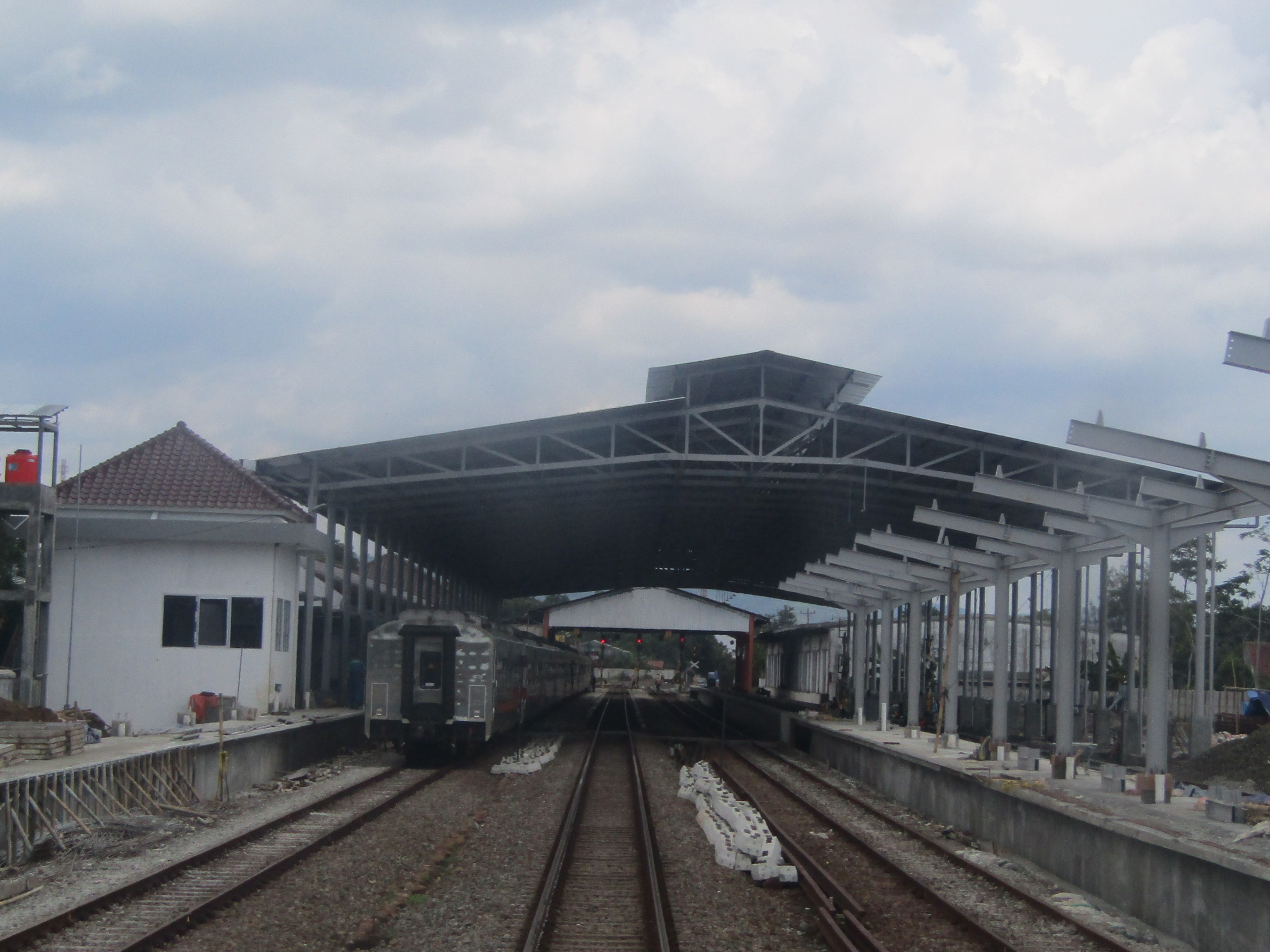 Emplasemen Stasiun Gombong, 2020